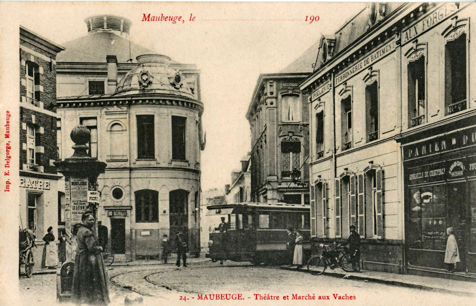 Carte postale ancienne éditée par E. Delgorge à Maubeuge, n°24 :MAUBEUGE - Théâtre et Marché aux vaches